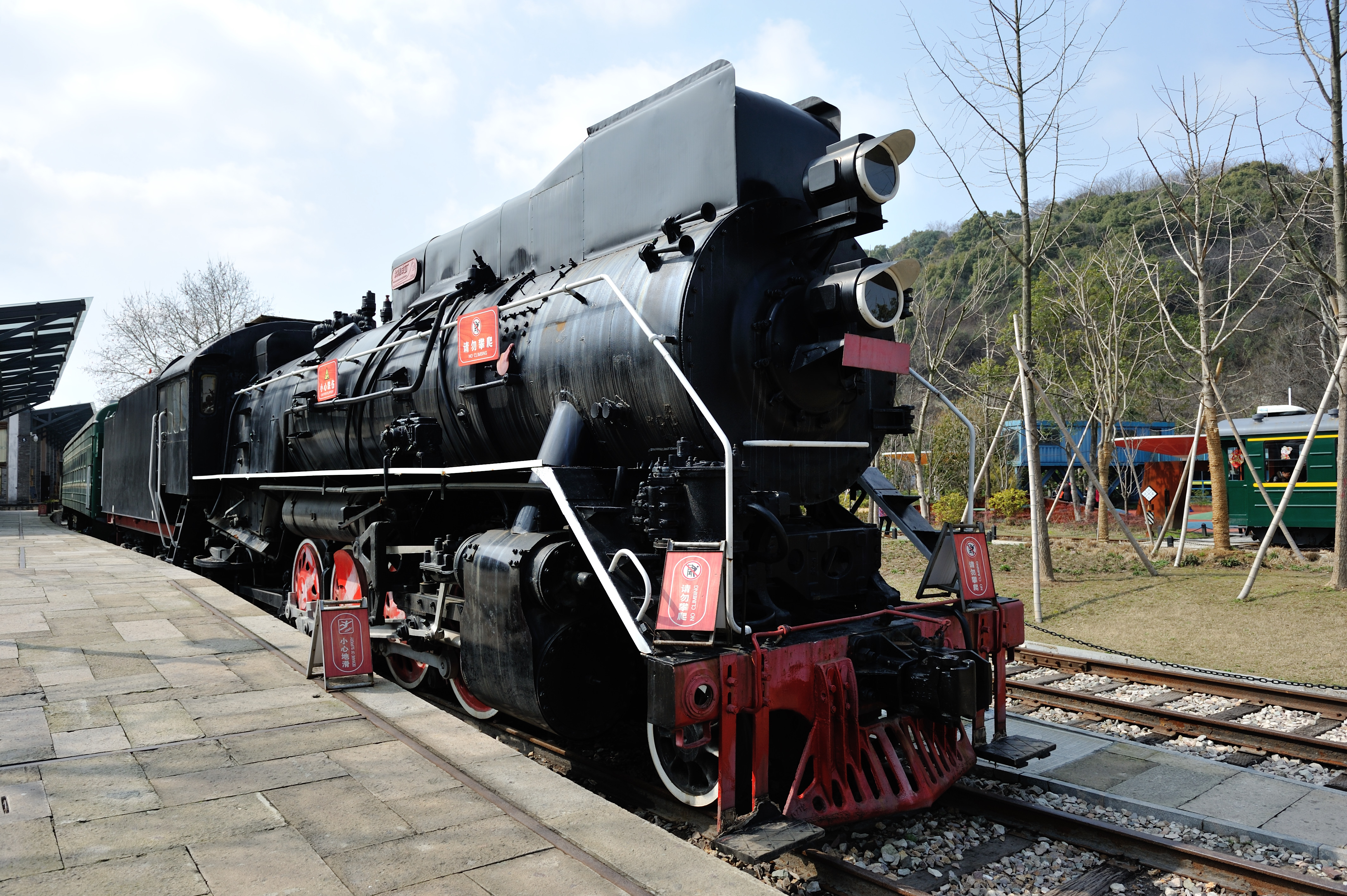 杭州白塔公园JS-8401号机车